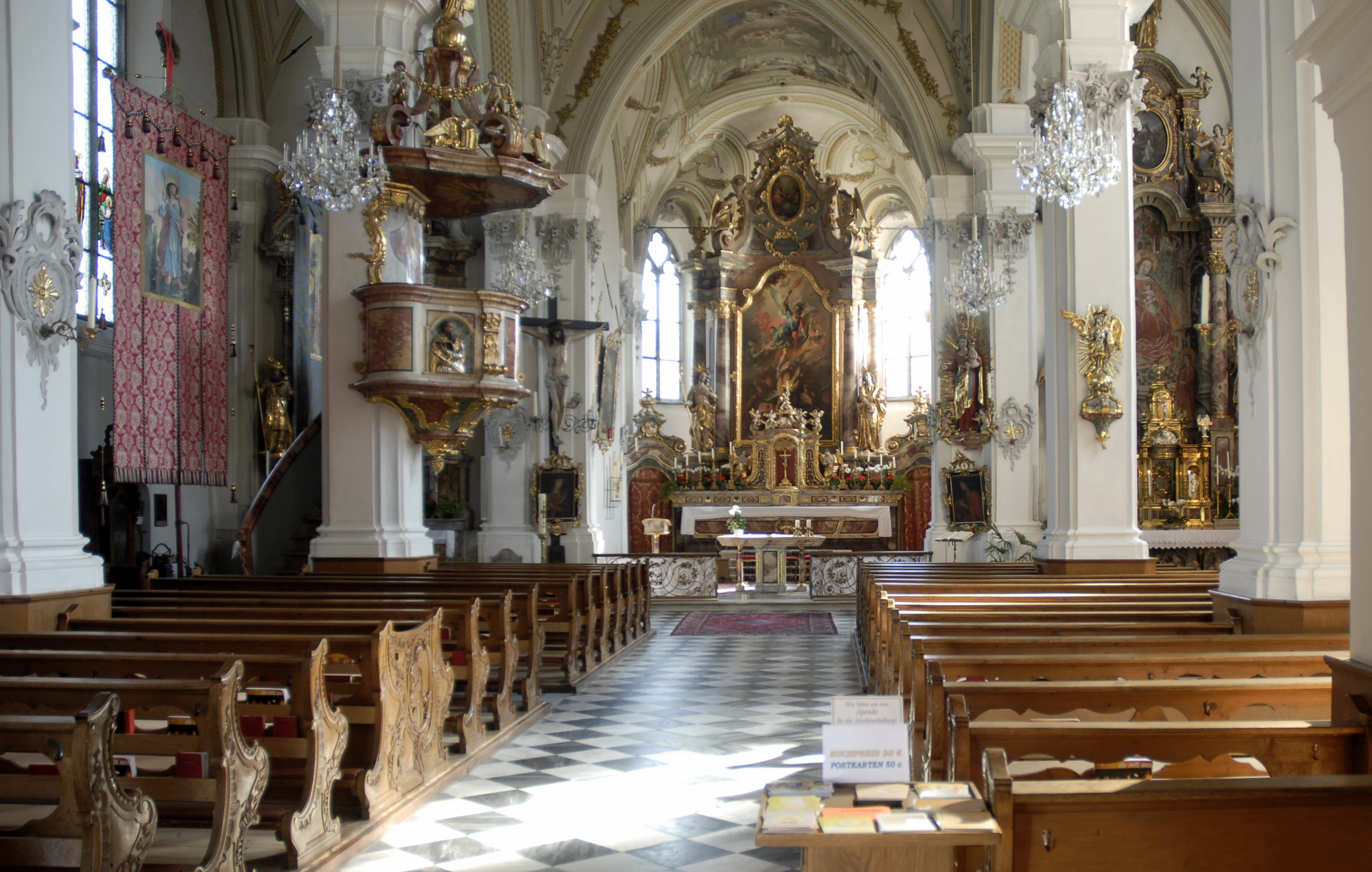 Innenansicht der Basilika Absam